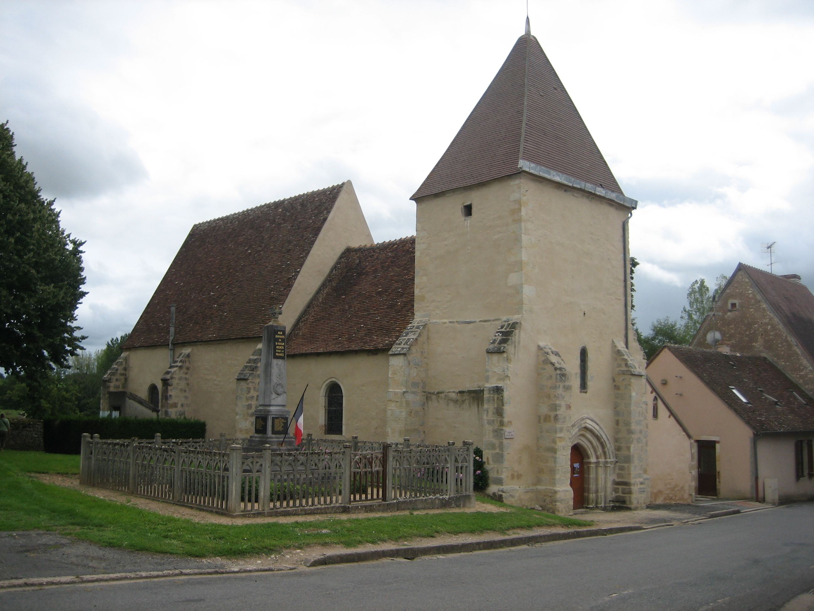 Eglise Saint-Maur à Saint-Maur (Cher)